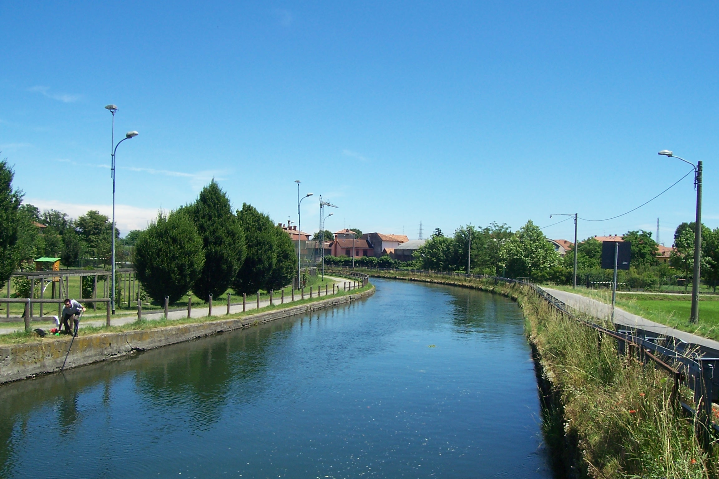 Canale di Bereguardo, l' ansa di Castelletto di Abbiategrasso.